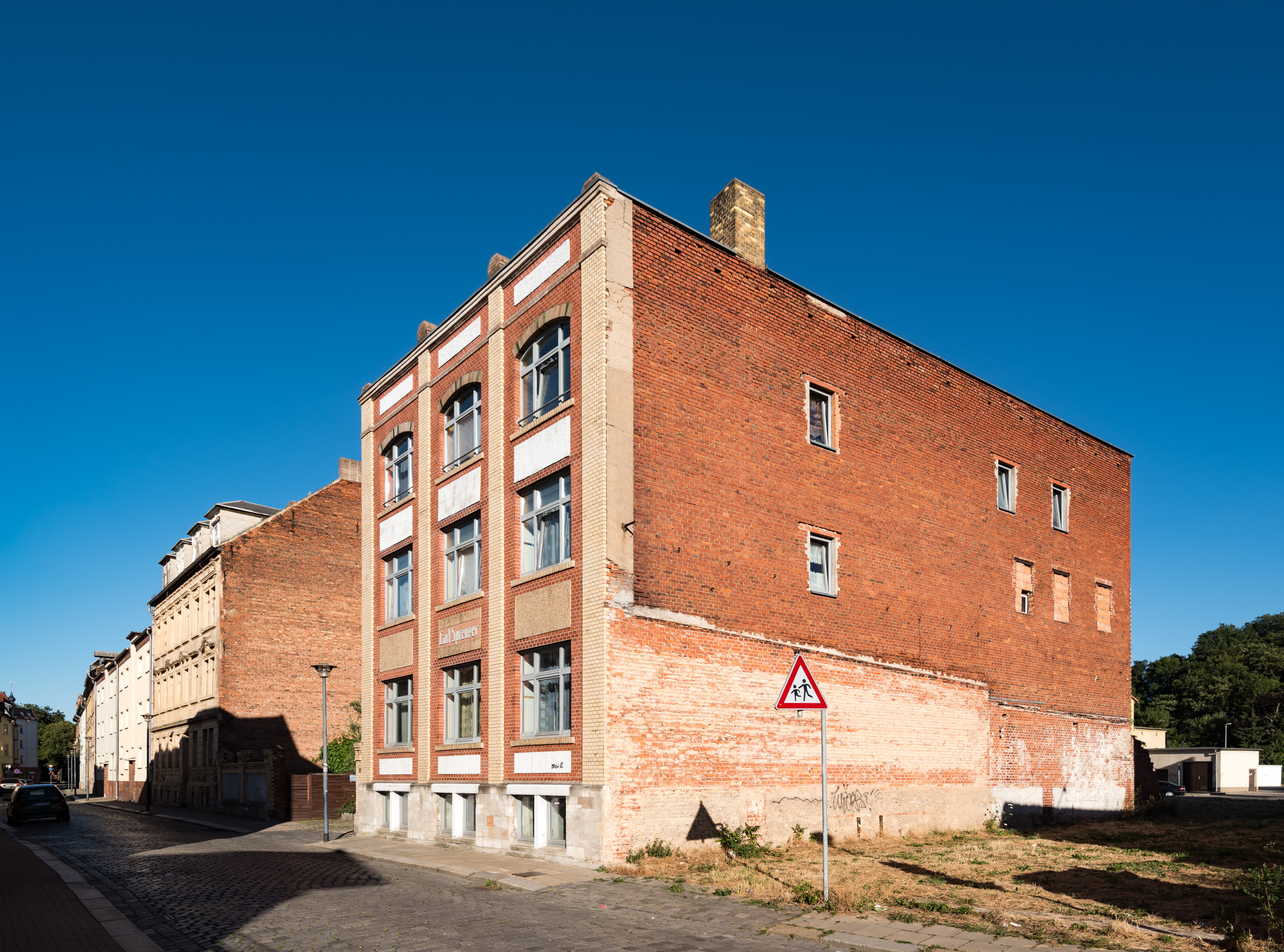 Weißenfels, Rudolf-Götze-Straße 22, 24